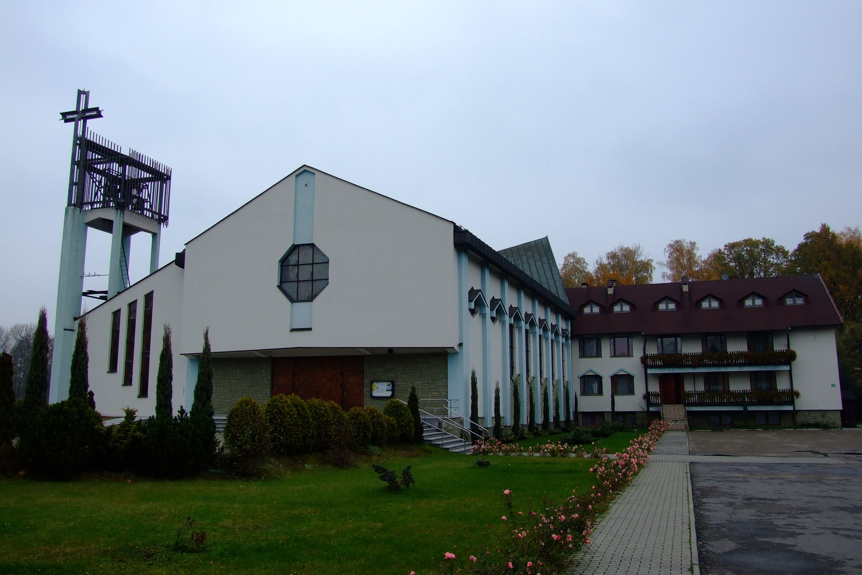 Kościół św. Jana Sarkandra i klasztor franciszkanów w Górkach Wielkich